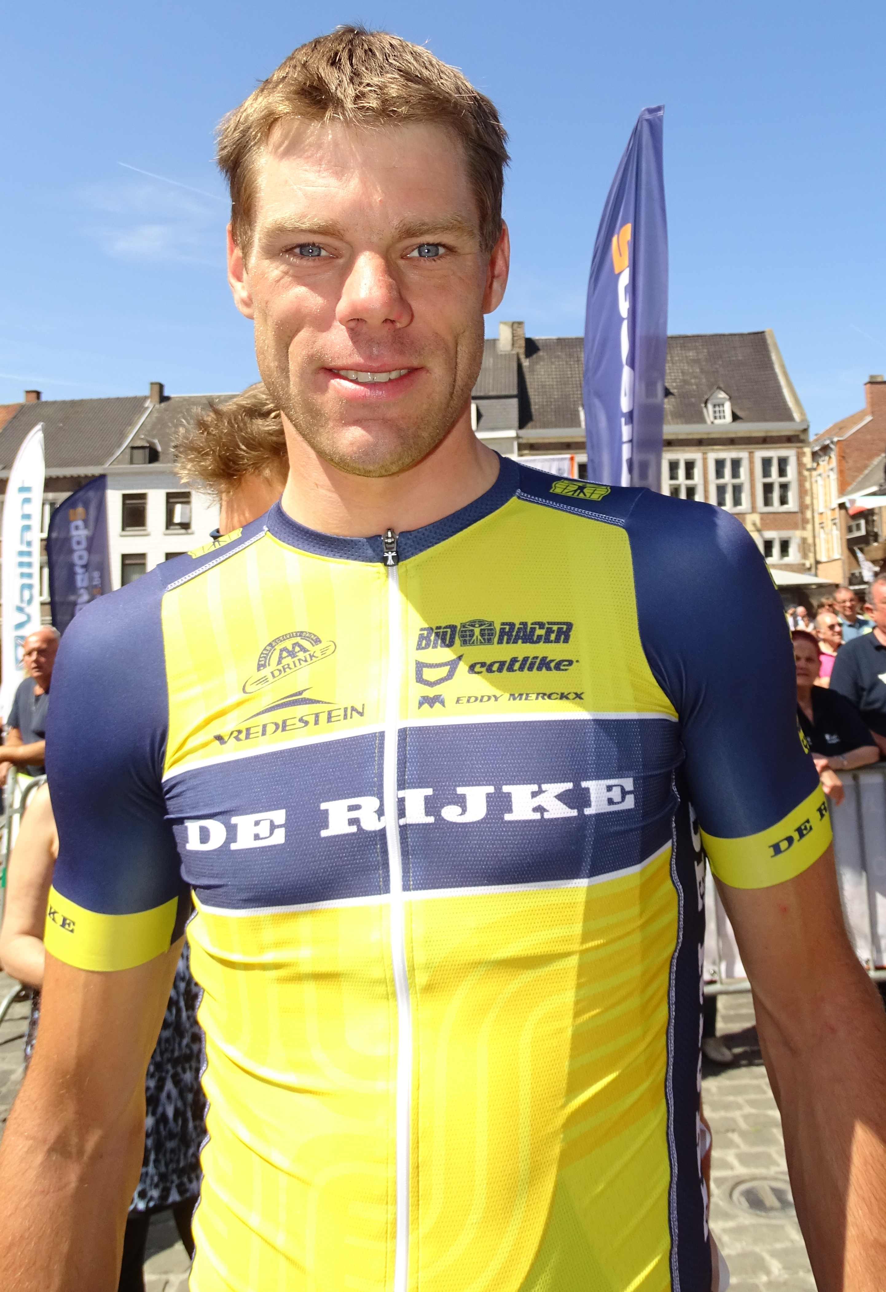 Reportage réalisé le dimanche 14 juin à l'occasion du départ et de l'arrivée du Tour du Limbourg 2015 à Tongres, Belgique.